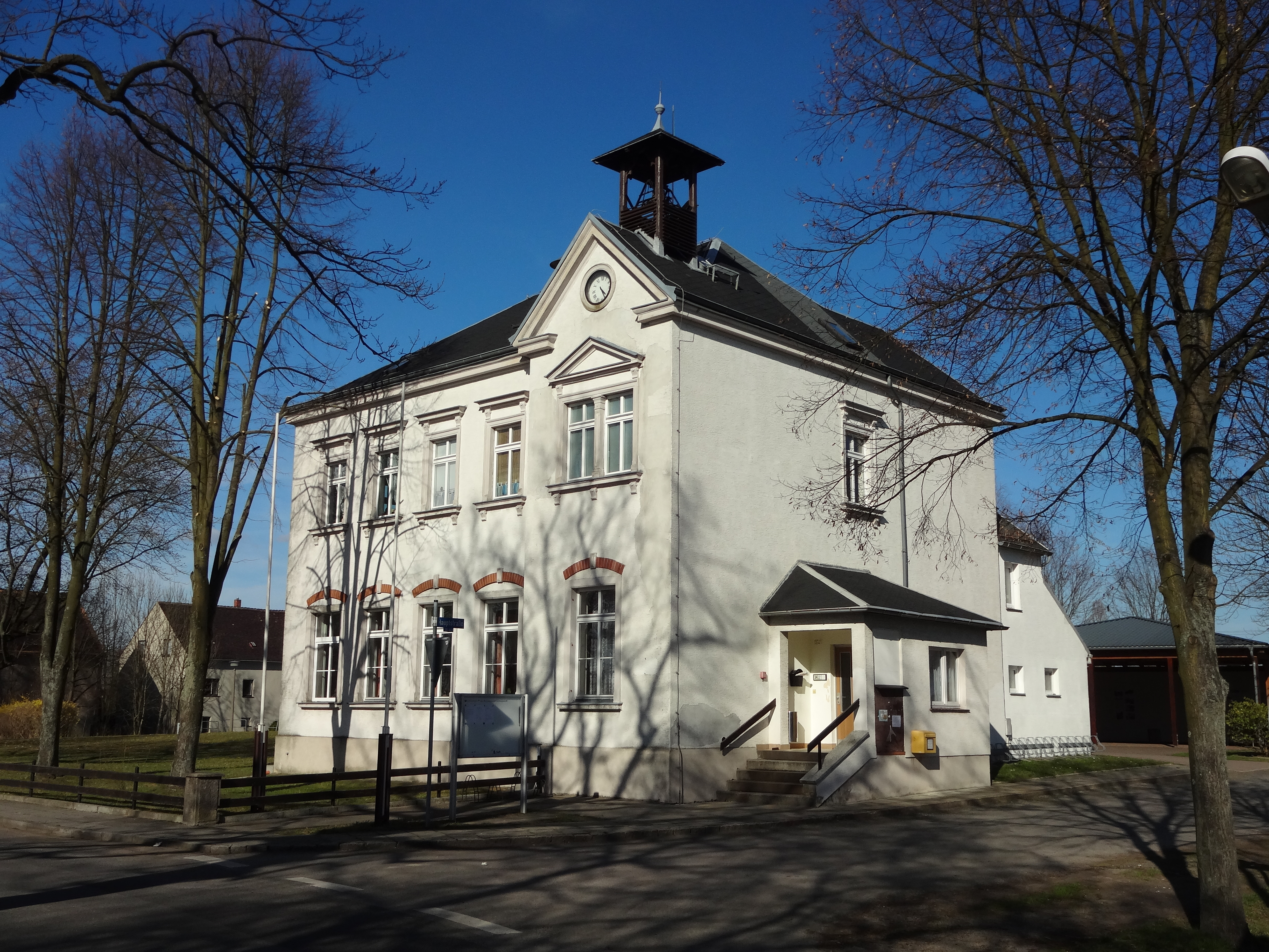 Kulturdenkmal Schule in der Hauptstraße 34 in Bulleritz, Gemeinde Schwepnitz